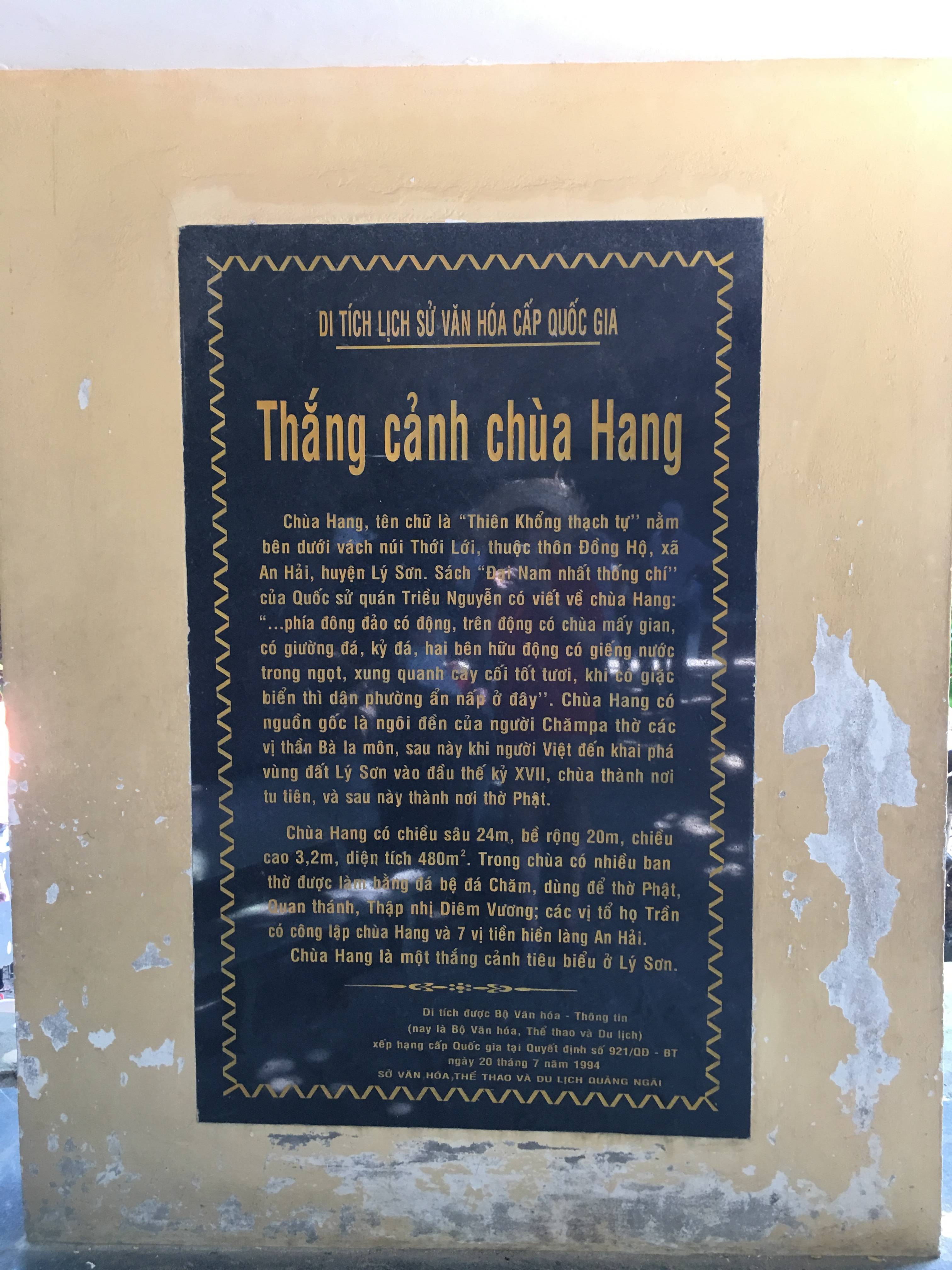 Chùa Hang là một trong những danh cảnh tiêu của Lý Sơn